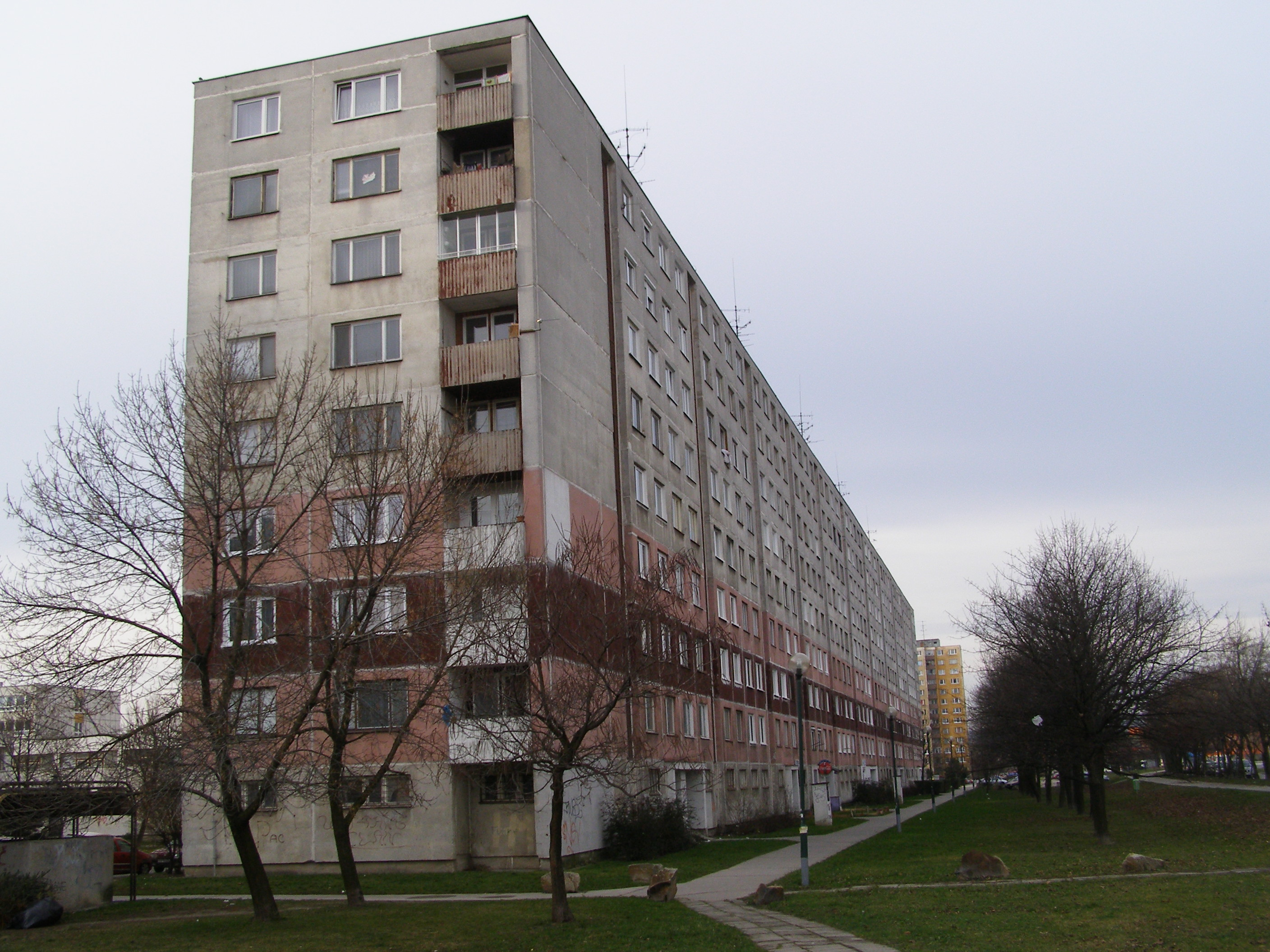 Brančská Street House, Petržalka, Bratislava